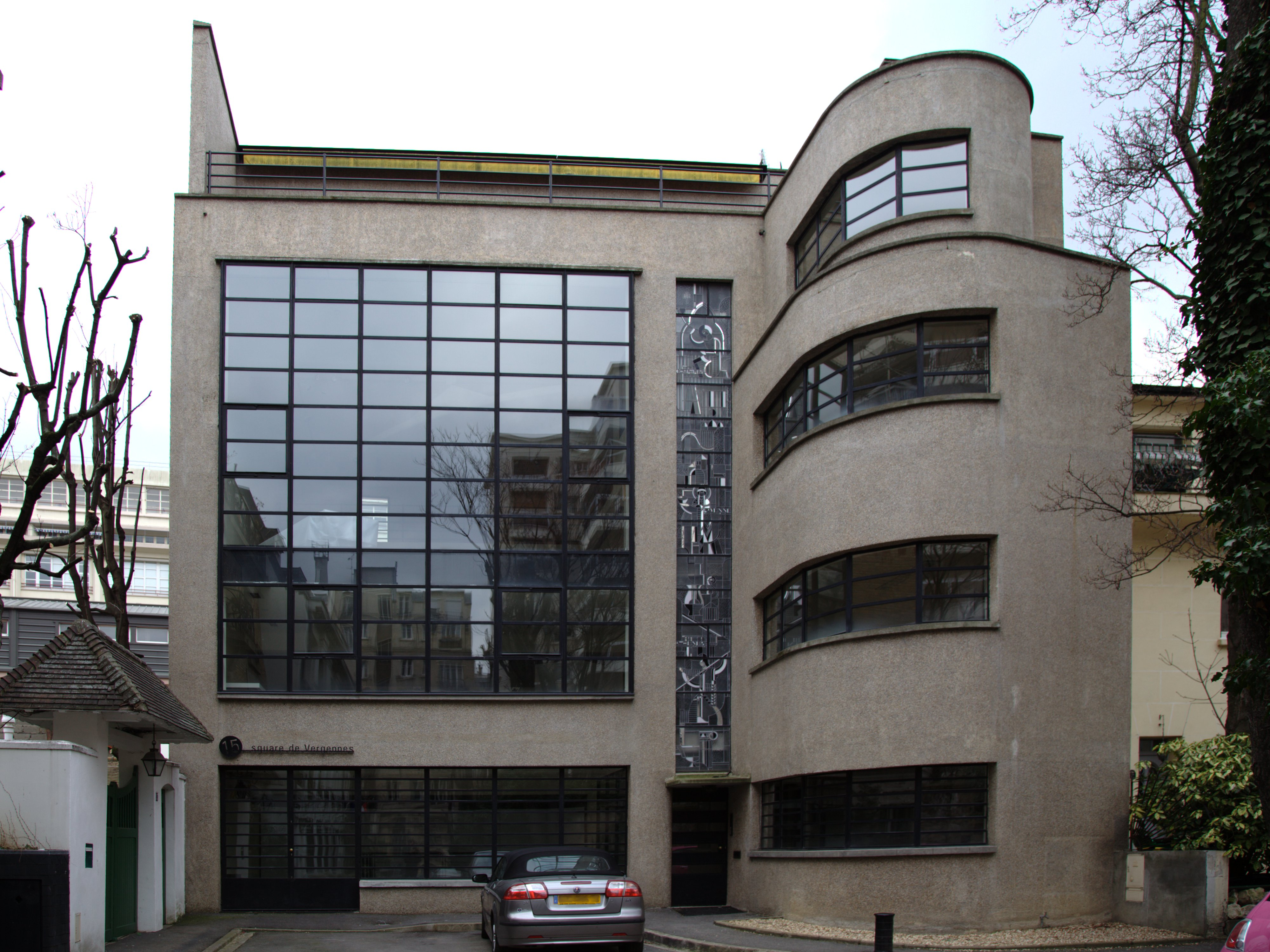 Maison et atelier du maître-verrier Barillet, 15 square Vergennes, Paris XVe, construit par Robert Mallet-Stevens (1886-1945). Musée Mendjisky-Ecoles de Paris entre avril 2014 et janvier 2017.